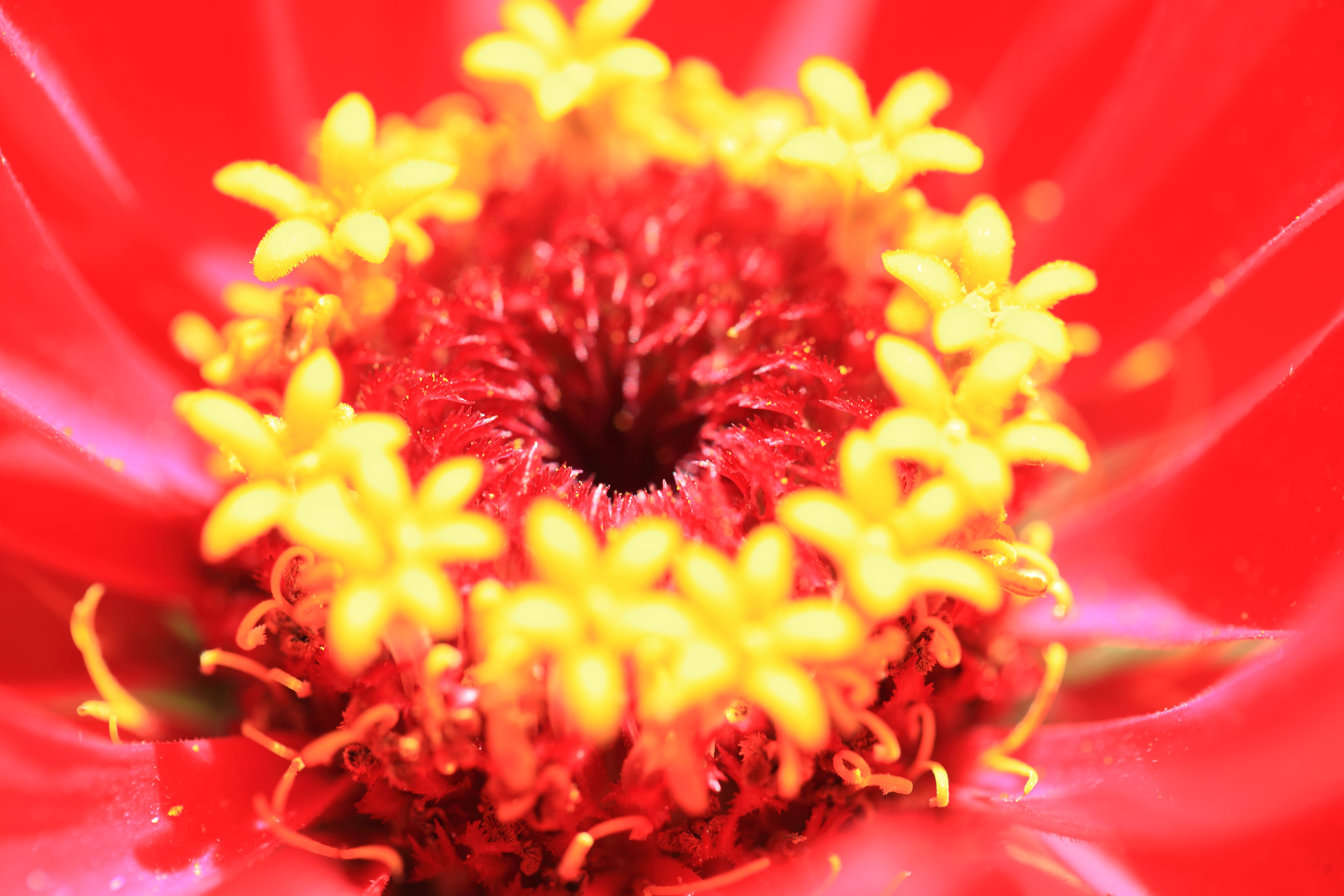 الزهرة القرصية الداخلية لنبات الزينيا